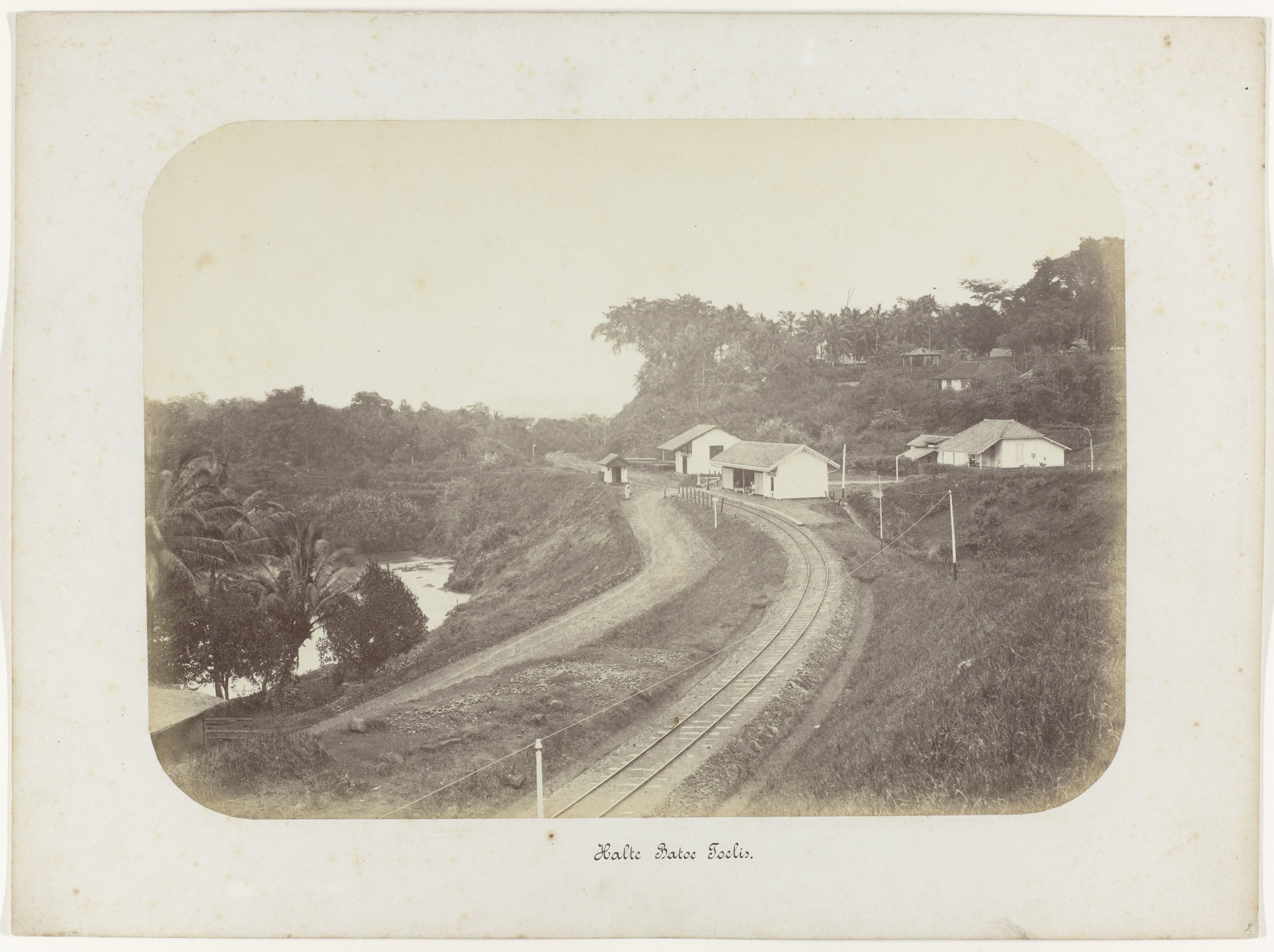 IdentificatieTitel(s): Halte Batoe Toelis (titel op object)Staatsspoorwegen op Java (serietitel)Objecttype: foto Objectnummer: NG-1988-26-44Omschrijving: De spoorweg met de halte Batoe Toelis. Onderdeel van een groep van 62 foto's in een doos met het opschrift "Staatsspoorwegen op Java" uit 1888.VervaardigingVervaardiger: fotograaf: anoniemPlaats vervaardiging: JavaDatering: 1880 - 1888Fysieke kenmerken: albuminedrukMateriaal: fotopapier Techniek: albuminedrukAfmetingen: foto: h 227 mm × b 320 mmkarton: h 300 mm × b 402 mmOnderwerpWanneer: 1880 - 1888Waar: Batoe ToelisVerwerving en rechtenVerwerving: aankoop 30-aug-1988Copyright: Publiek domein